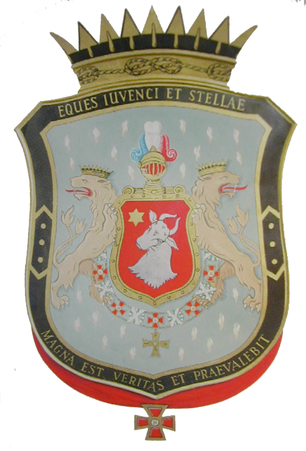 Bernhard Paus våpen som stormester for Frimurerordenen